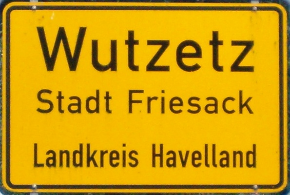 Ortstafel von Wutzetz in Brandenburg, Deutschland